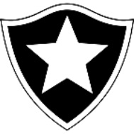 Escudo